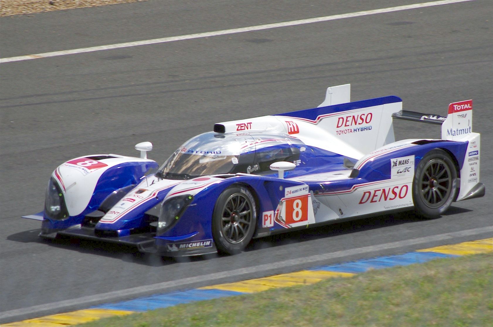 Le Mans 24 Hours, 2012